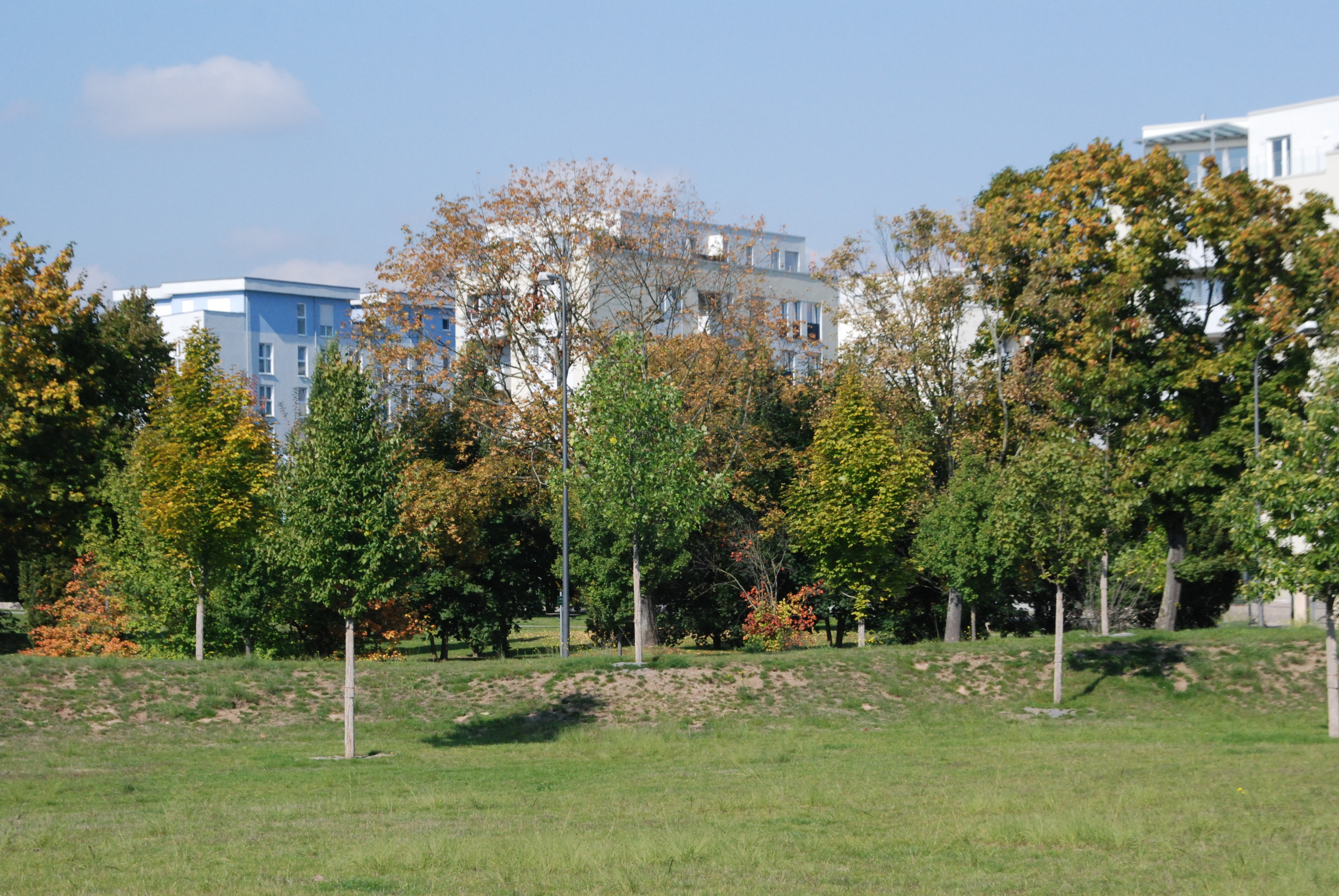 Frankfurt-Bockenheim; Europaviertel; Zeppelinpark, Blick auf Rebstock-Bebauung